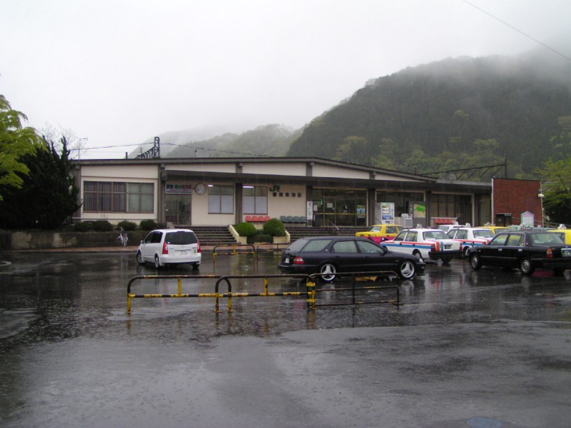 ja:2005年ja:5月7日に投稿者がja:磐梯熱海駅で撮影しました。